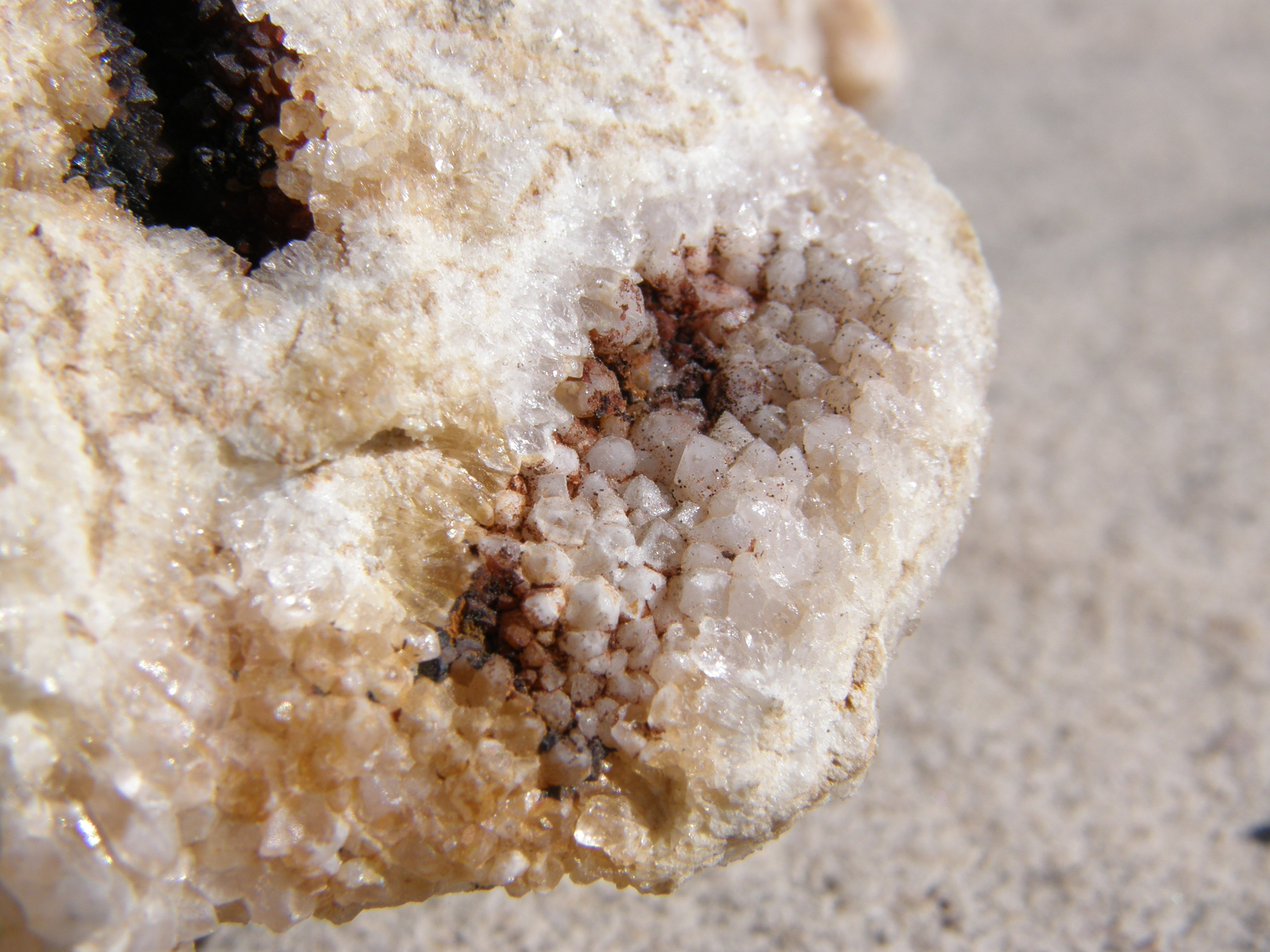 Cristal